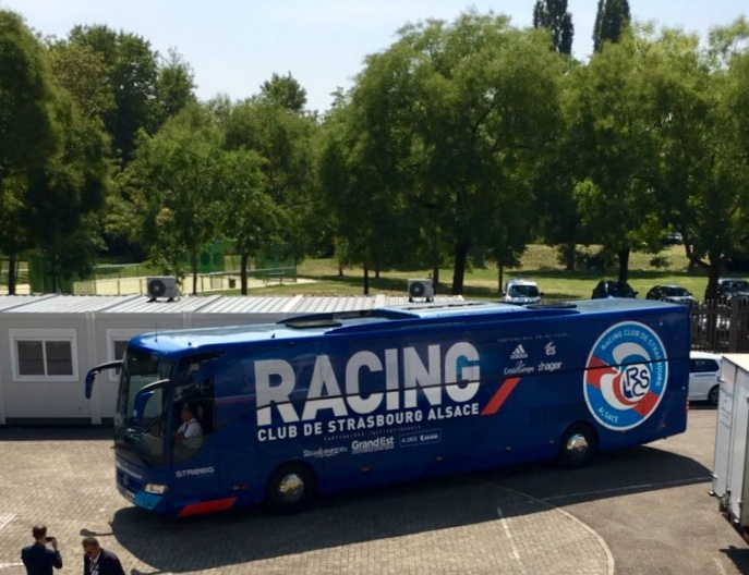 Le bus servant à transporter les joueurs du Racing club de Strasbourg Alsace, acquis en 2018 par le club.